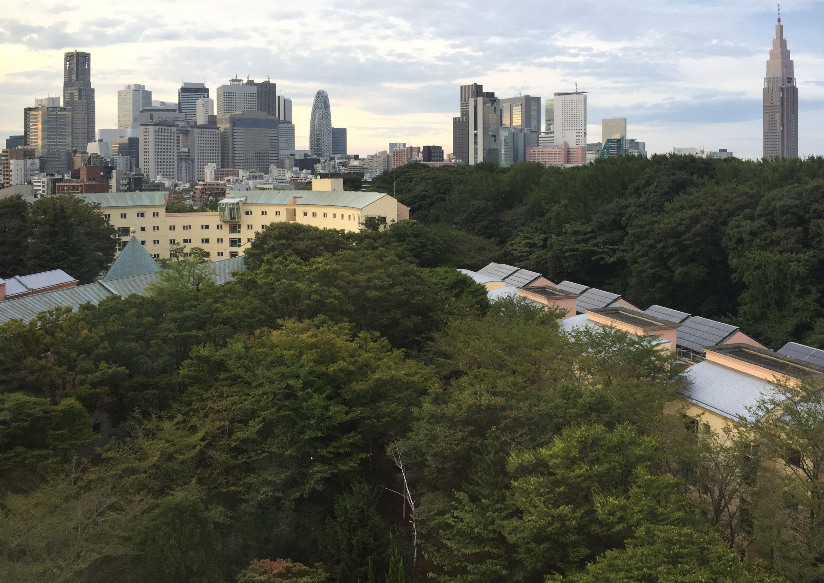 国立オリンピック記念青少年総合センターの宿泊D棟の9階から、右側の宿泊B棟(低層棟)、奥の宿泊A棟、左側の宿泊C棟を見下ろした写真。